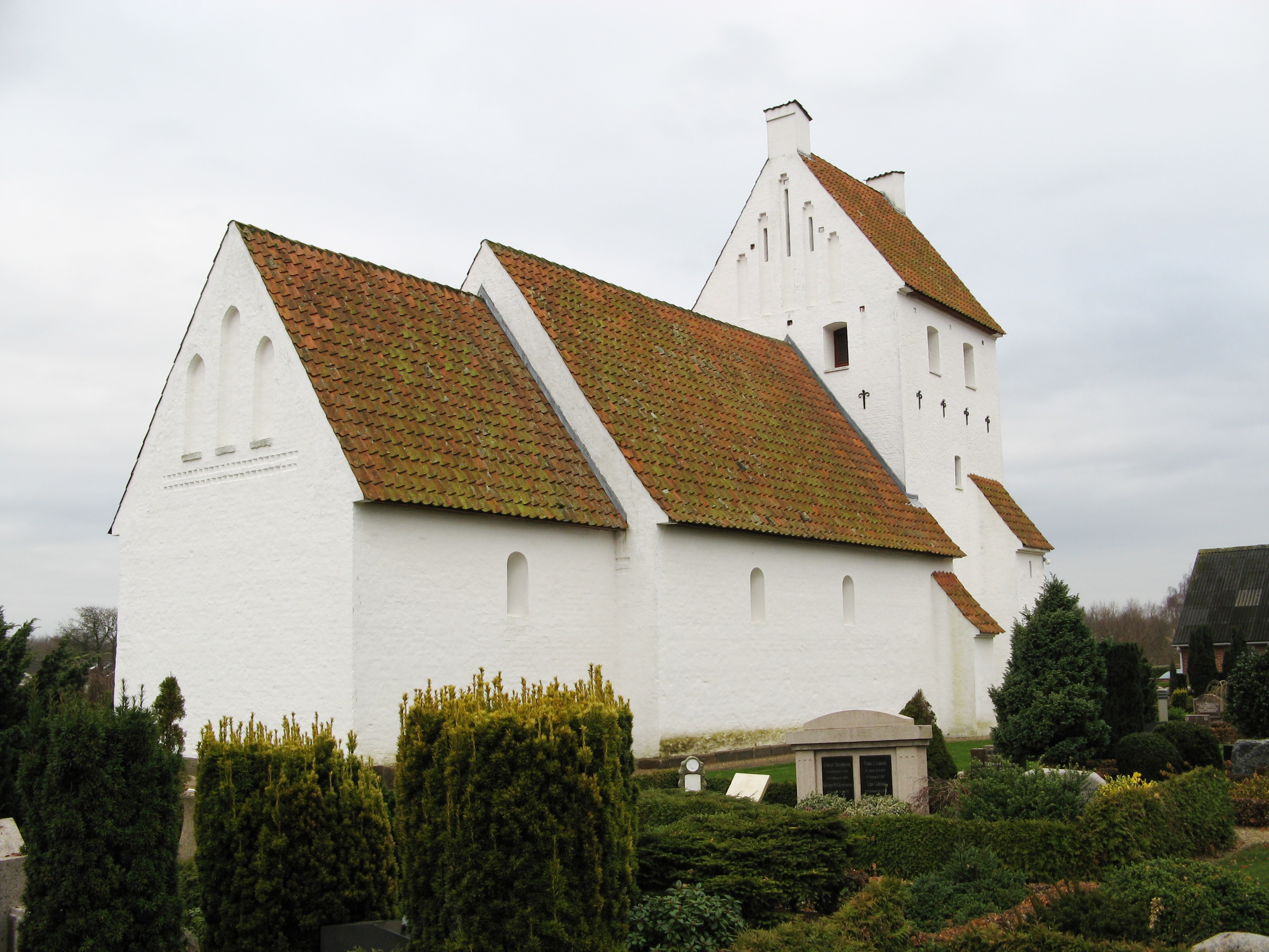 Vejrup kirke, Vejrup sogn, Esbjerg kommune (former: Gørding Herred, Ribe Amt). Kirken set fra nordøst